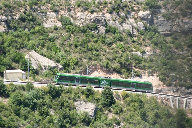 Automotor eléctrico Stadler GTW del Cremallera de Montserrat (comarca del Bages, provincia de Barcelona, Catalunya).